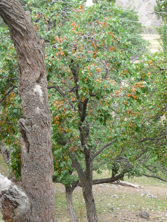 Aprikosenbäume in ca 3200m Meereshöhe im Kloster Alchi in Ladakh